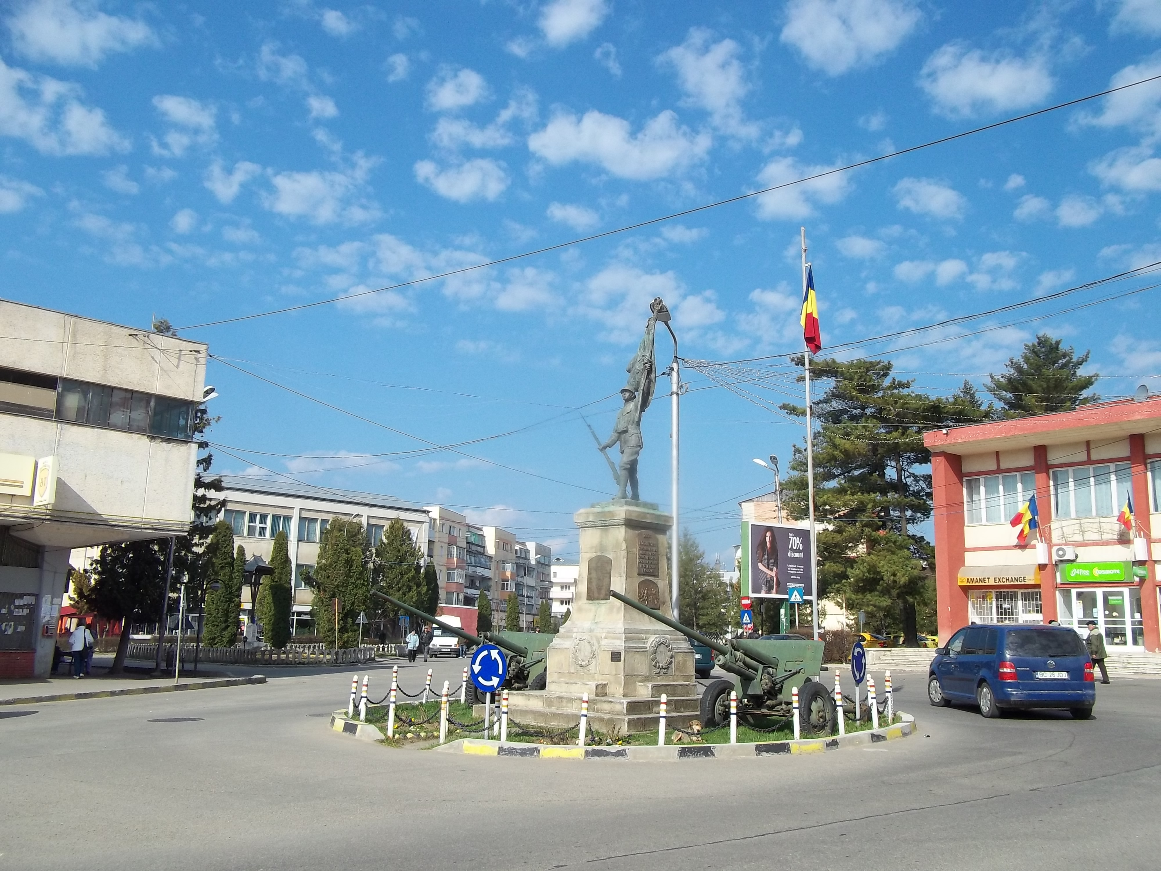 Monument din Localitatea Buhusi închinat soldaților din Primul Război Mondial